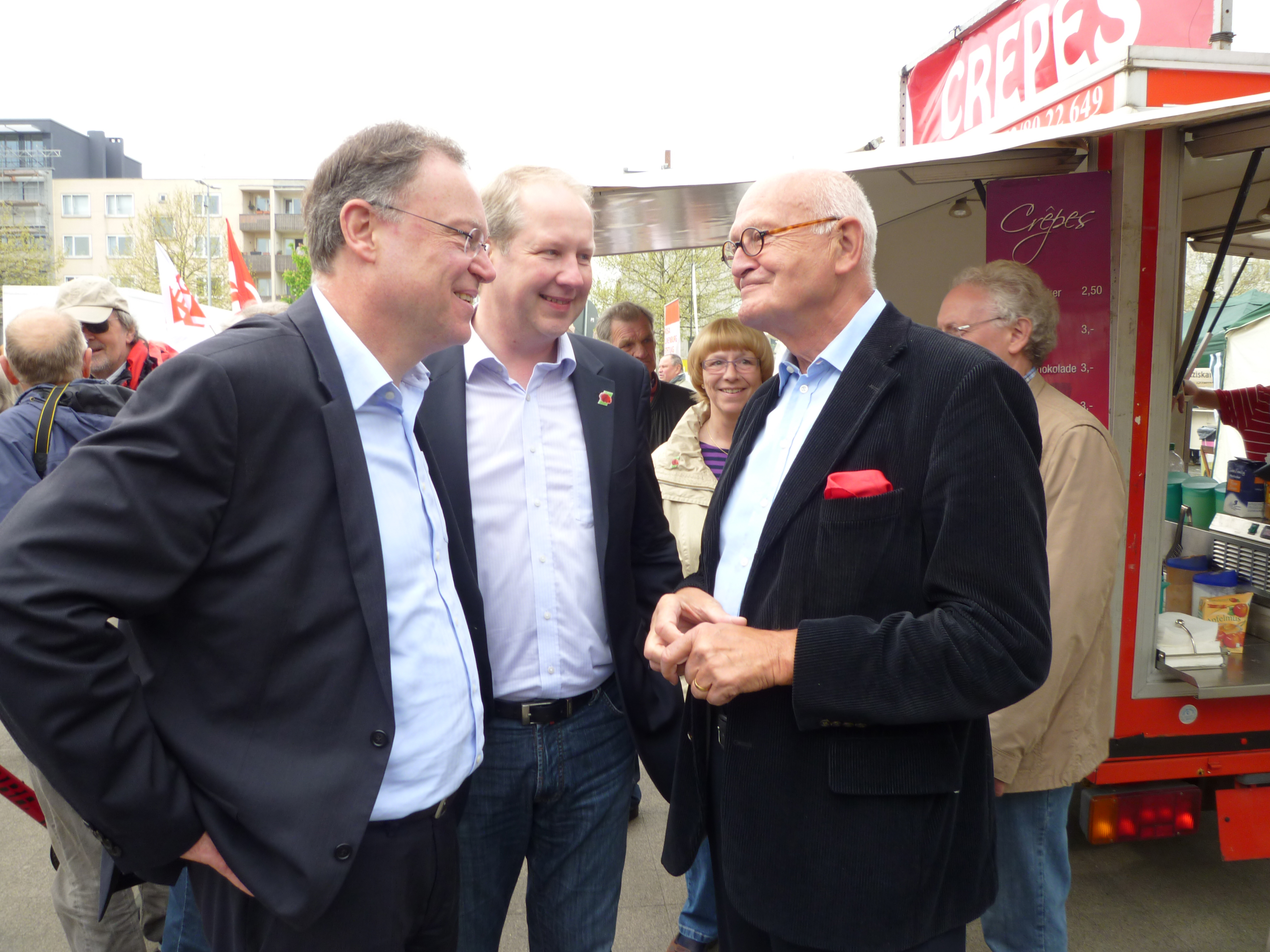 Sie haben ein besseres Bild? Sogar ein historisches! Zeigen Sie's uns. Wikipedia gehört uns. Allen Menschen.